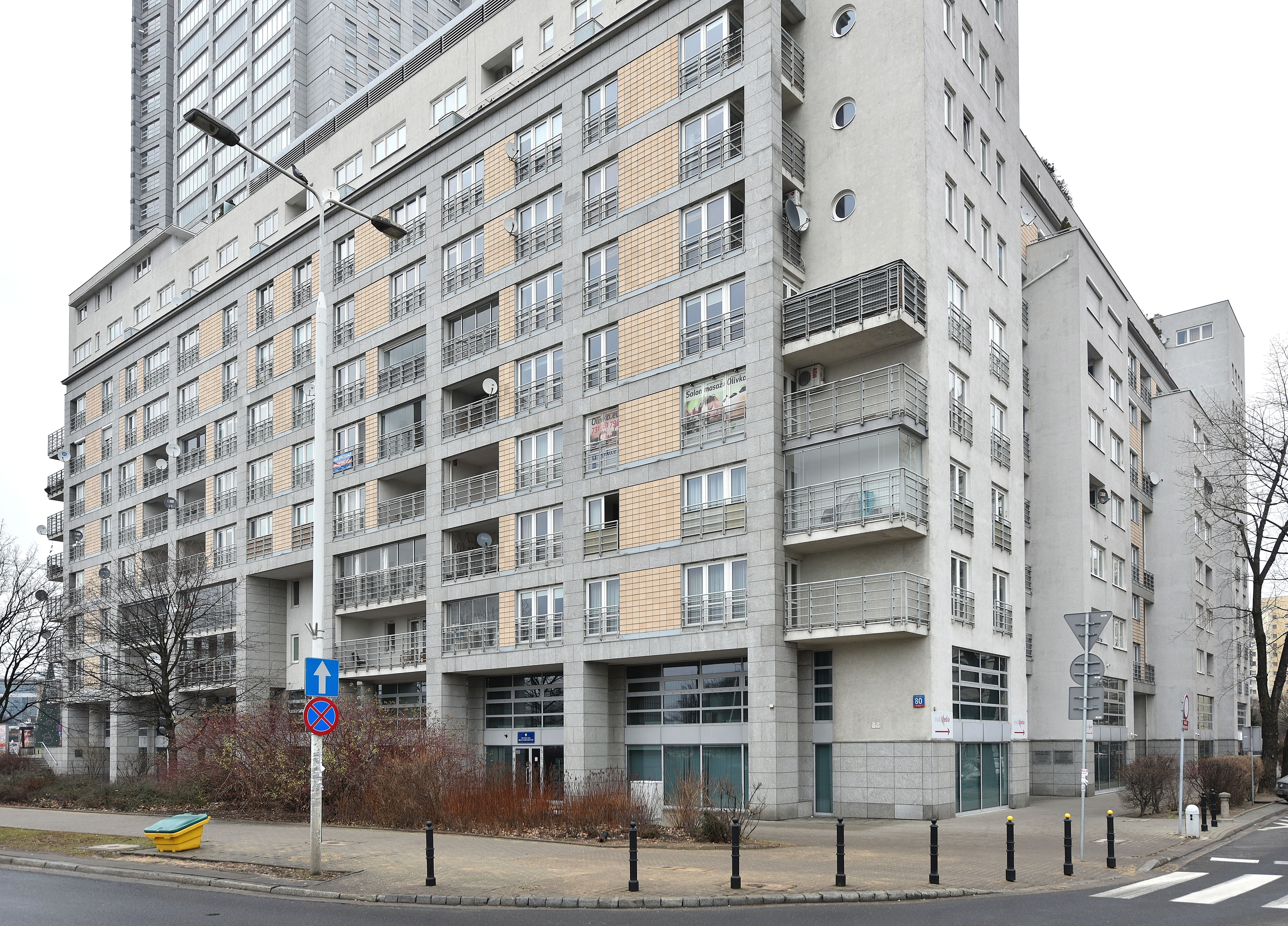 Aleja Jana Pawła II 80 w Warszawie